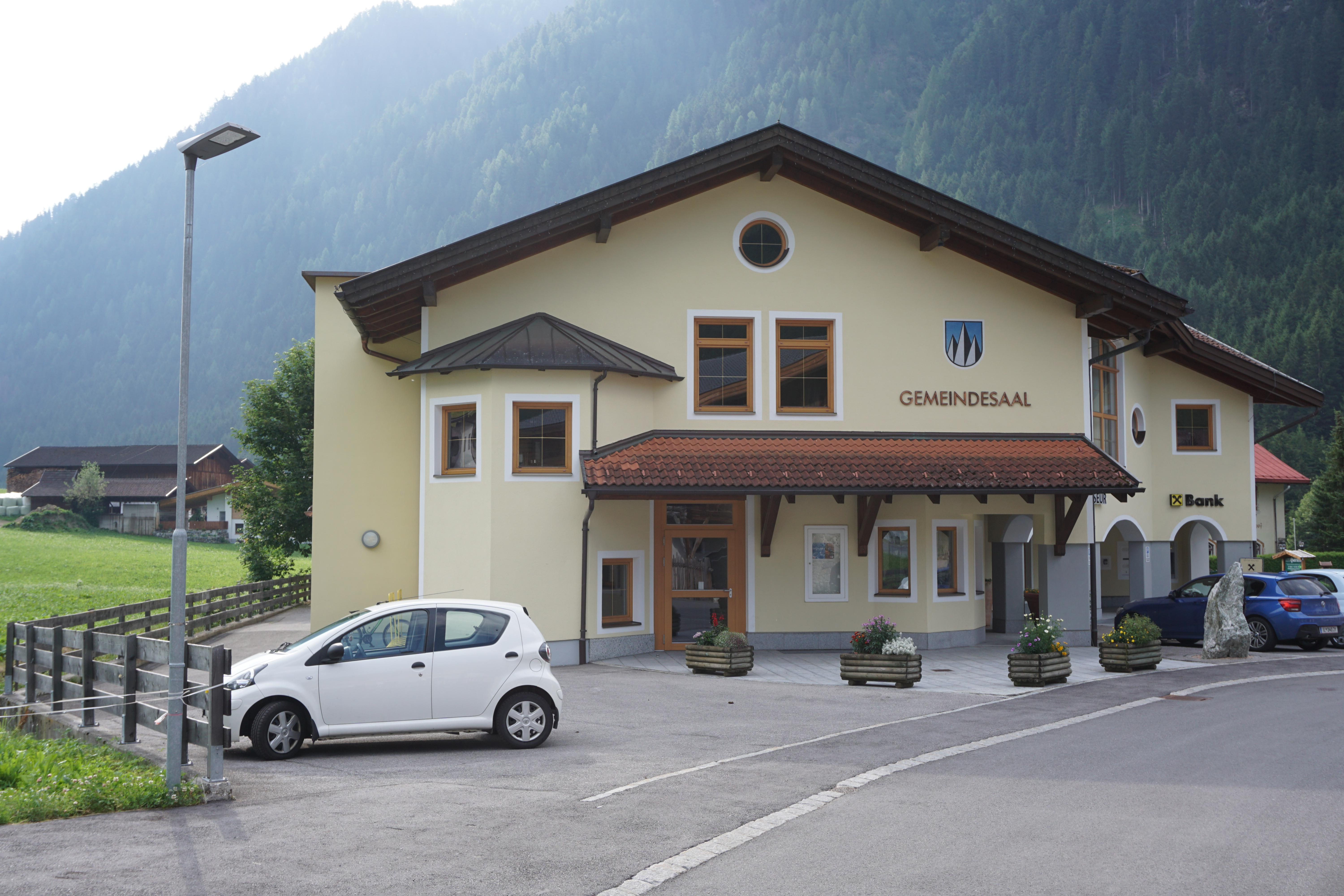 Gemeindesaal This media shows the remarkable cultural object in the Austrian state of Tyrol listed by the Tyrolean Art Cadastre with the ID 48410. (on tirisMaps, pdf, more images on Commons, Wikidata)